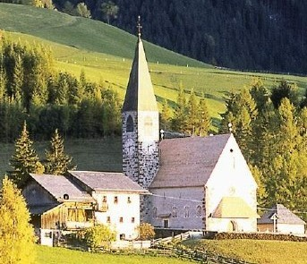 Villnöß, South Tyrol, St. Magdalenen church